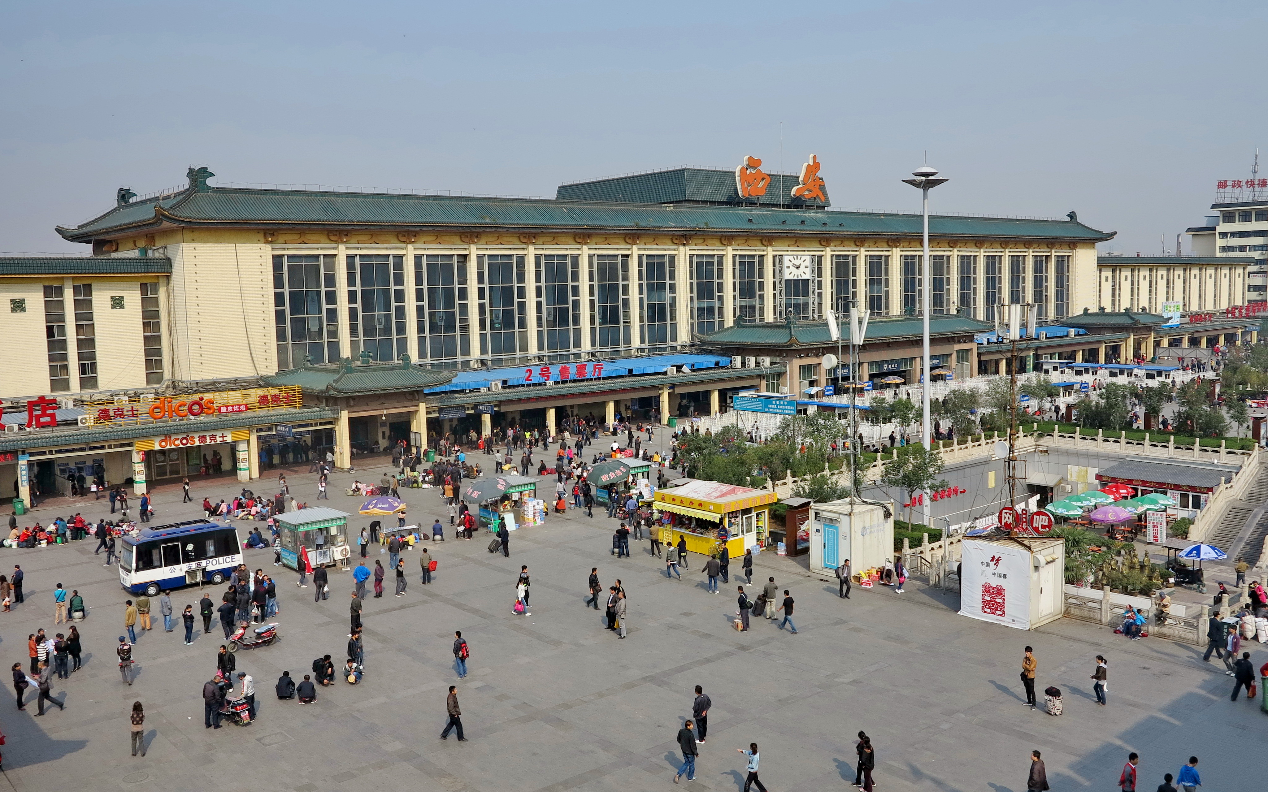 陕西省西安火车站